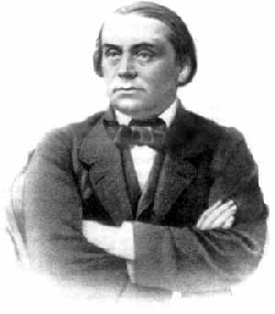 Иван Гончаров